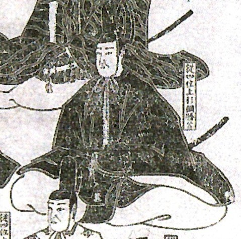 上杉綱勝の肖像。